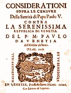 Paolo Sarpi, "Protesto"